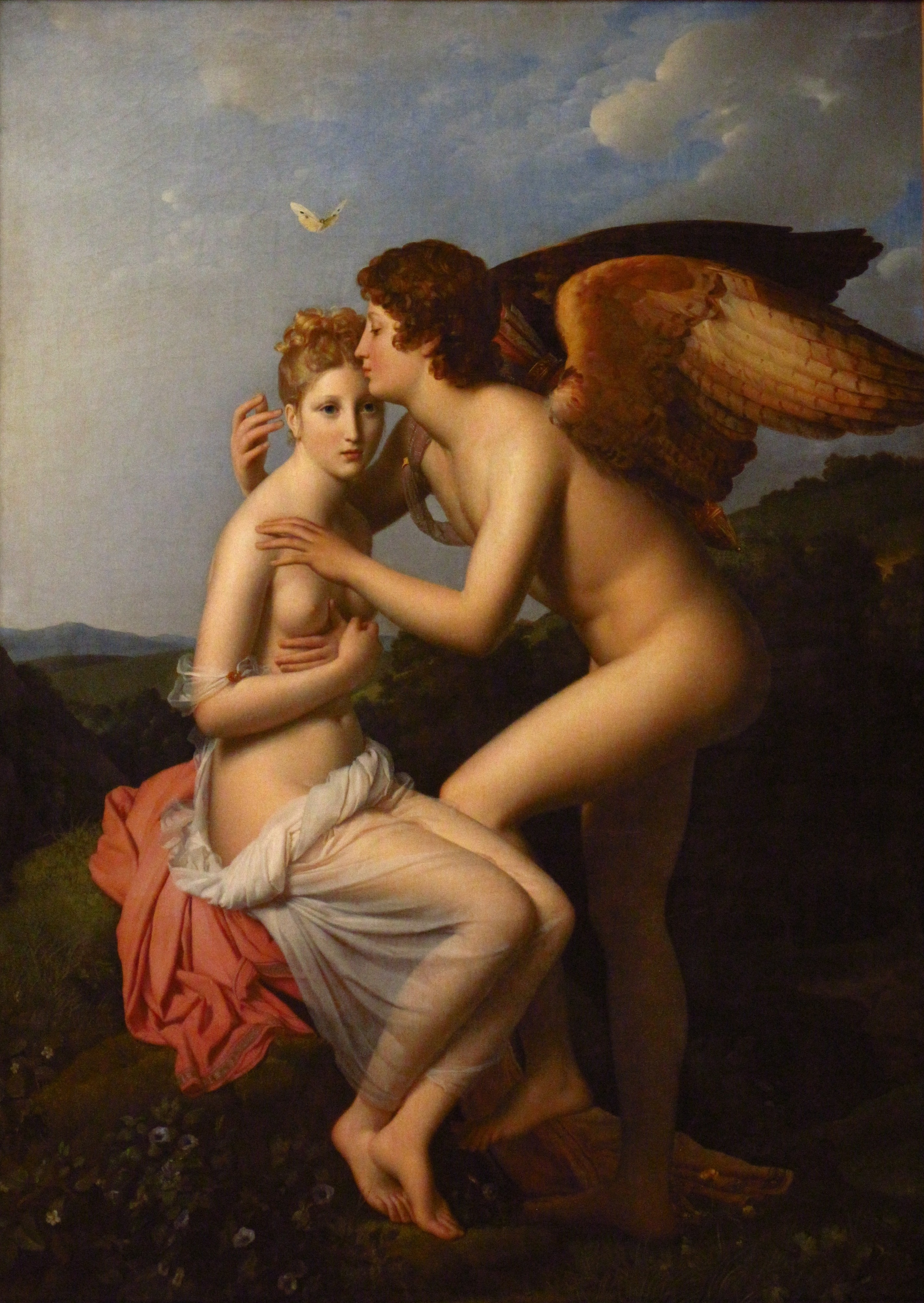 "Cupidon et Psyché", présenté au salon de 1798.